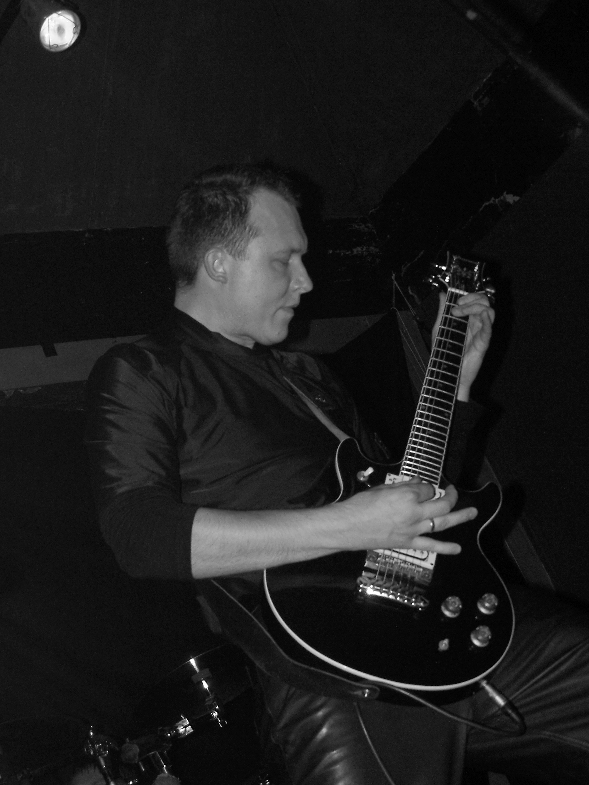 Bartłomiej Kostrzewa - gitarzysta zespołu Asgaard.